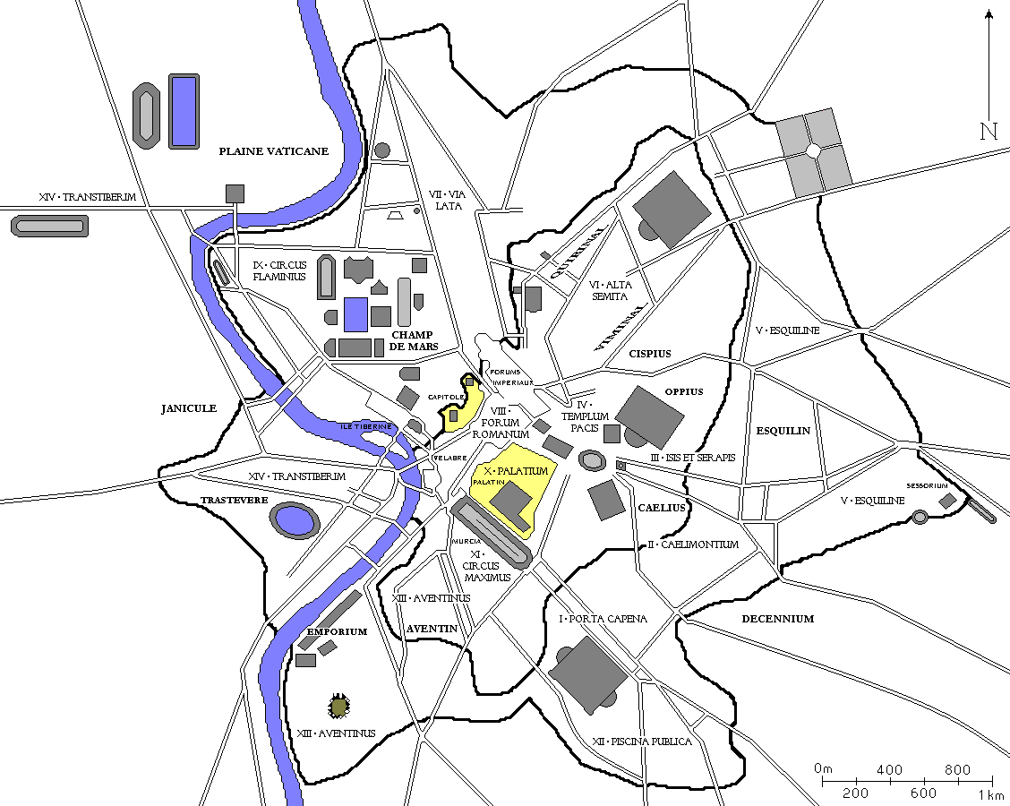 Plan de Rome redessiné à partir de diverses sources. Tous les bâtiments importants construits jusqu'à la fin de l'Empire romain sont dessinés, ainsi que les régions d'Auguste et les collines de Rome. Version obsolète. Voir File:Planrome2b.png